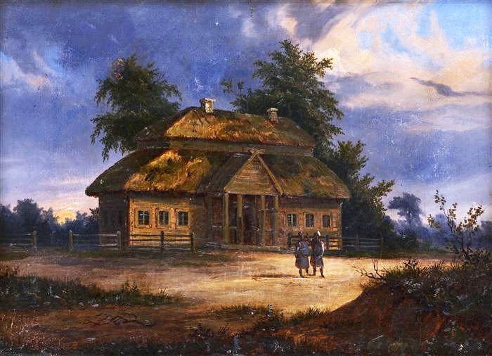 Manor house of Tadeusz Kościuszko